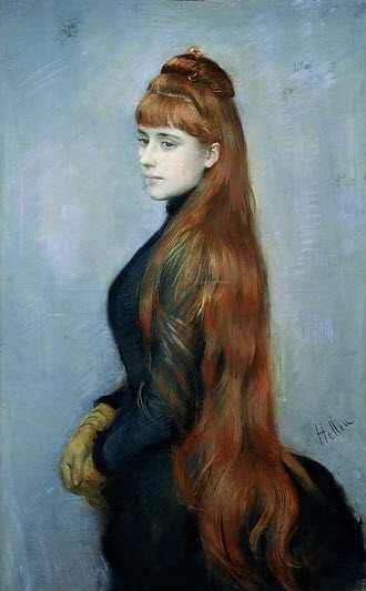 Description Caption from the museum: "Grâce à son ami Rafael de Ochoa y Madrazo, Paul-César Helleu reçoit la commande de l’un de ses premiers grand pastels, par M. et Mme Louis-Guérin. C’est leur fille Alice, à 14 ans, qui est représentée par l’artiste en 1884. Dans ce portrait, Paul-César Helleu prouve sa maîtrise de la technique du pastel sur toile, travaillé dans une gamme restreinte de couleurs. Les gris et noir bleutés mettent en valeur l’opulente chevelure rousse avec élégance et une certaine sobriété qui s’accorde avec la pose réservée de la jeune femme. Cette toile est présentée au Salon de la Société des Artistes français, à Paris, l’année suivante et suscite l’intérêt des critiques. Elle reflète deux aspects de l’œuvre d’Helleu : son talent de pastelliste et l’apparition d’un modèle incontournable. En effet, Helleu tombe amoureux d’Alice qu’il épousera an 1886. Très rapidement, elle devient l’incarnation de la femme élégante, de la mère aimante et de l’épouse gracieuse saisie dans ses gestes quotidiens, à travers toutes les techniques employées par Helleu : peinture, dessin, pastel, gravure. "